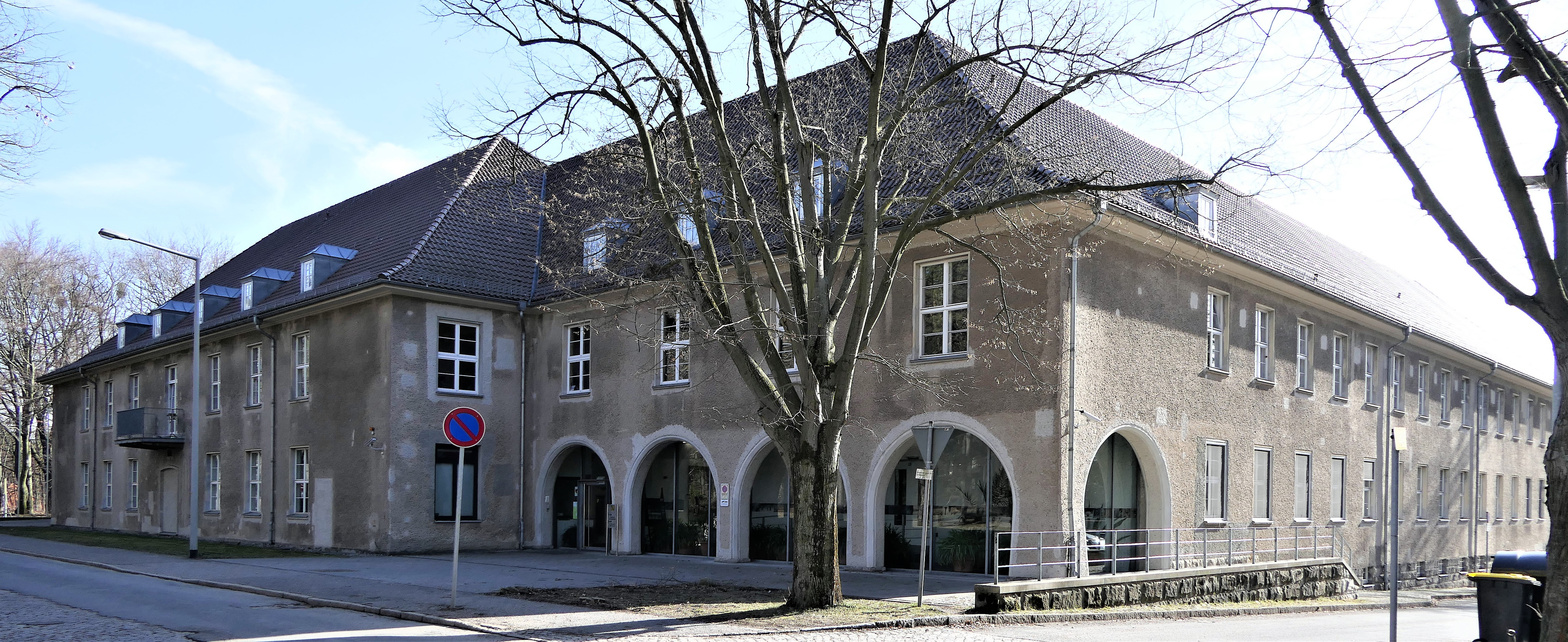 Landesamt für Archäologie Sachsen, Zur Wetterwarte 7, Dresden, Klotzsche 01109 Dresden